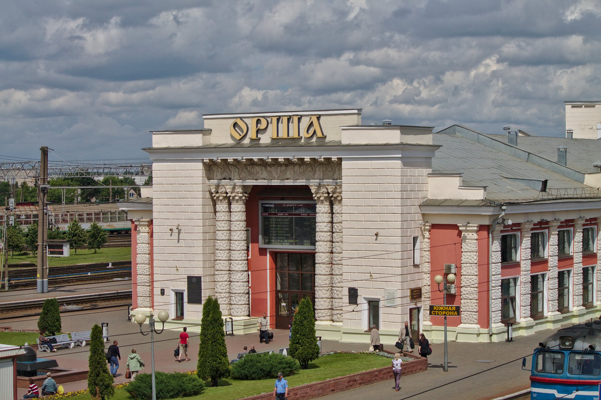 Вокзал, Орша-центральная. см. фото 601671 в альбоме автора